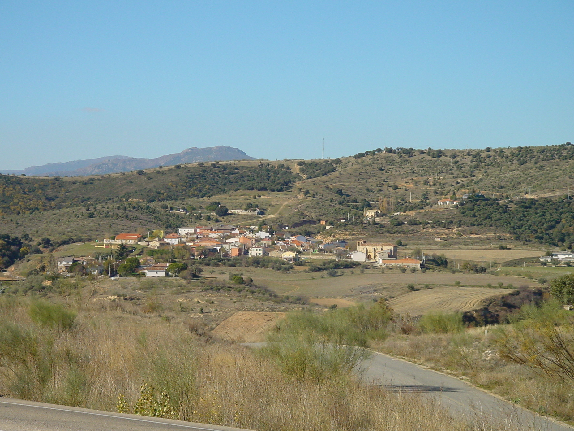 Vista de Redueña.